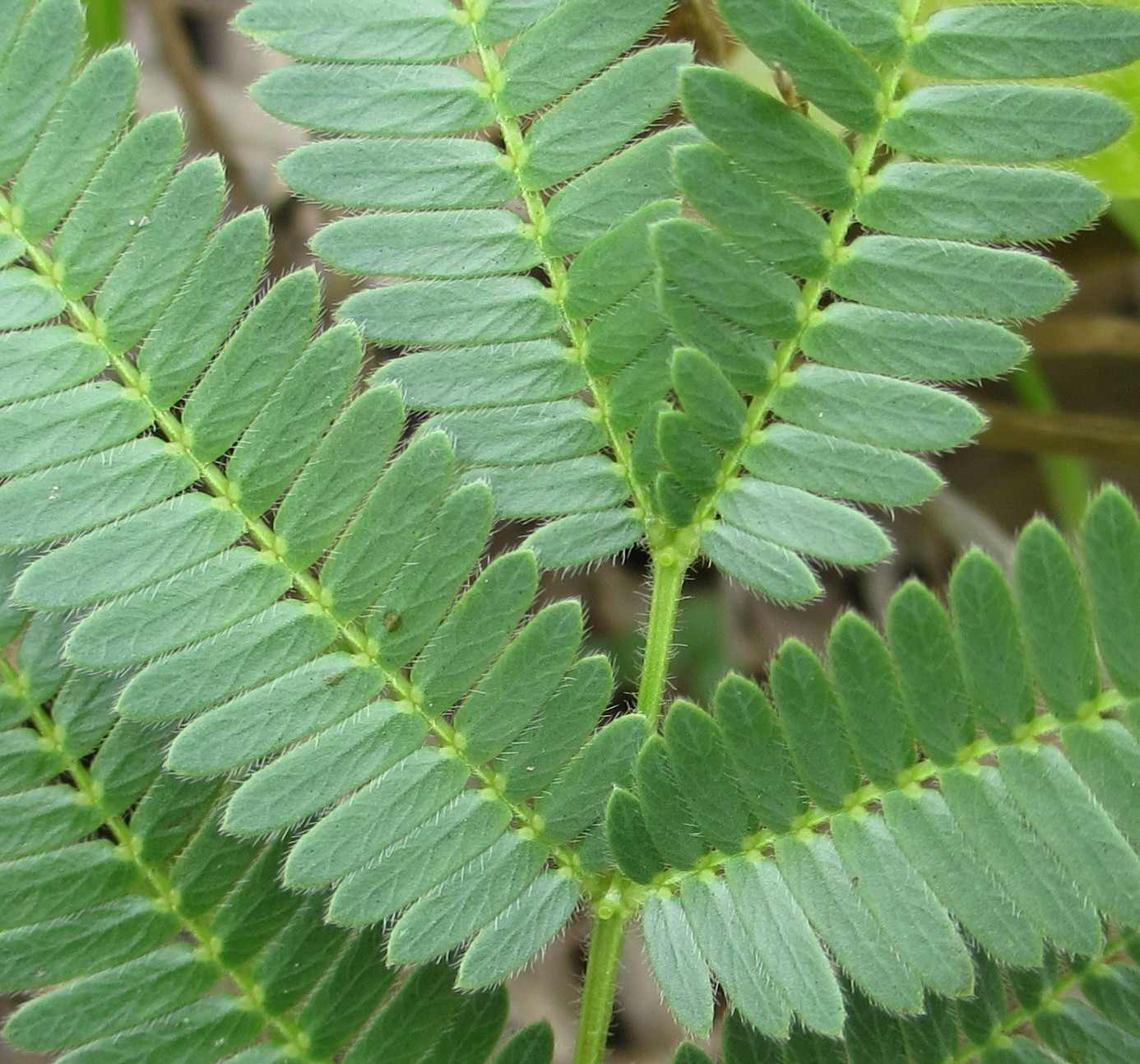 Acacia - leaf detail